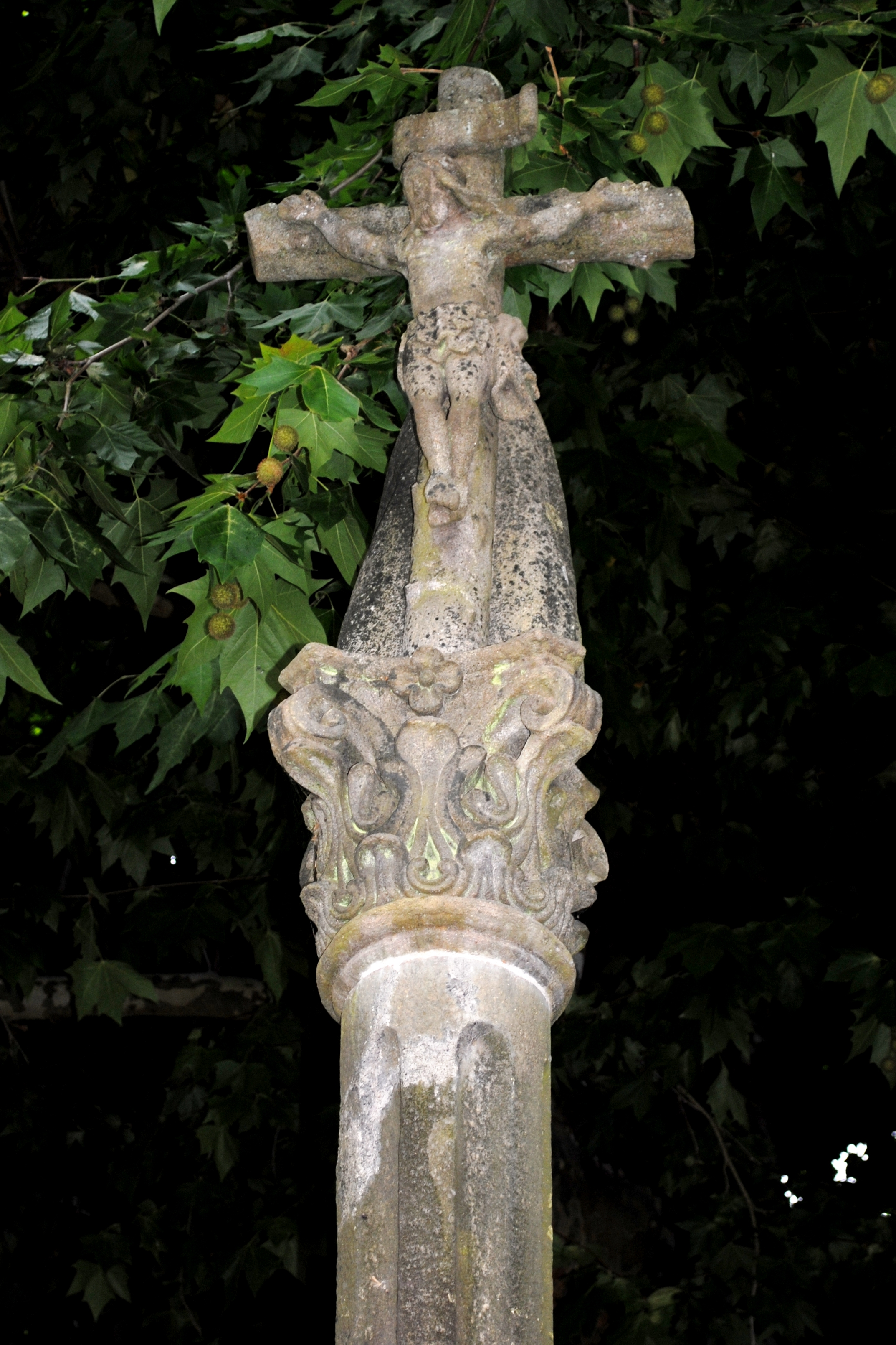 Santo André de Cedeira, Redondela, cruceiro, 1898.